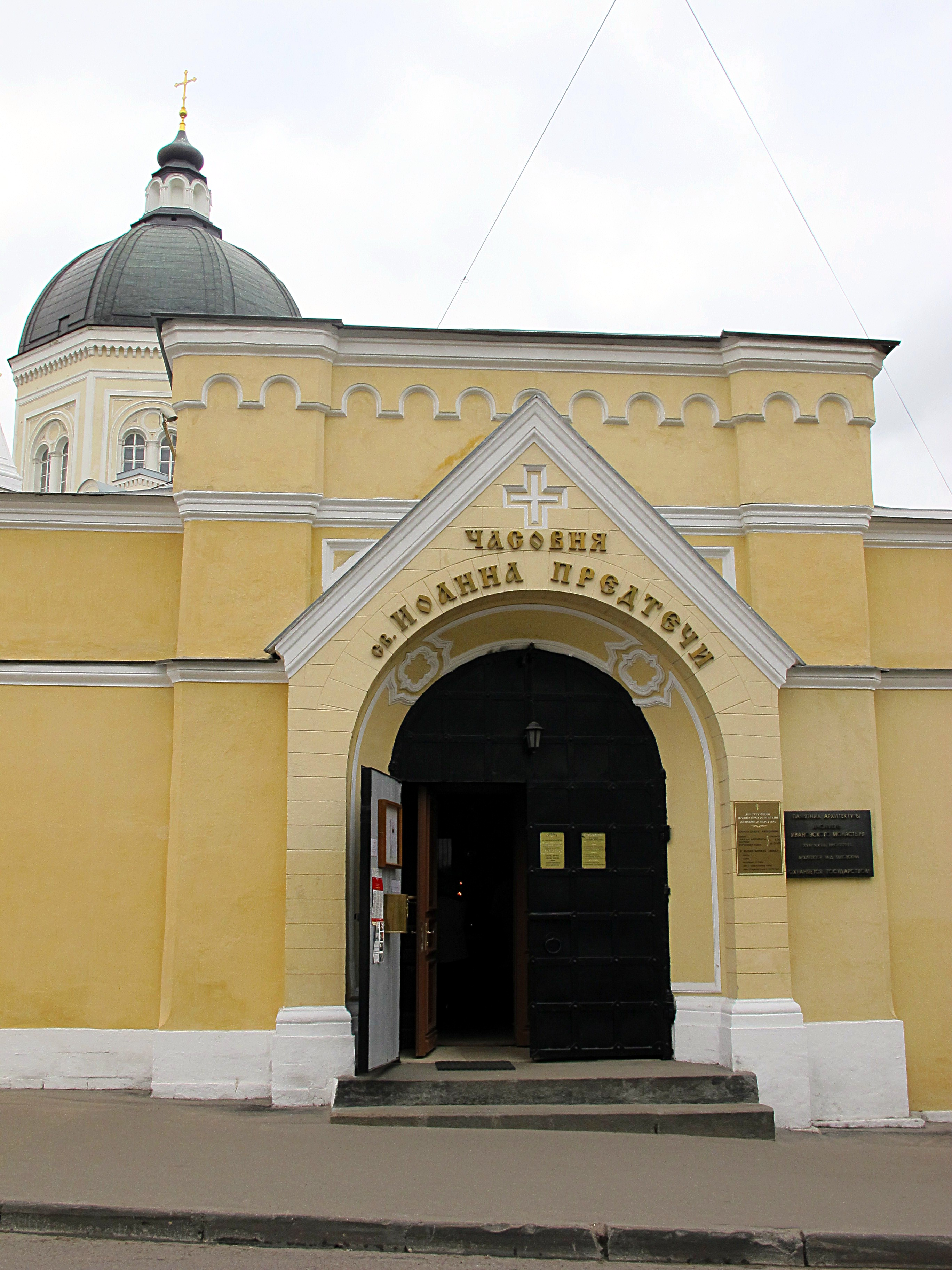 Часовня Святого Иоанна Предтечи Иоанно-Предтеченского женского монастыря